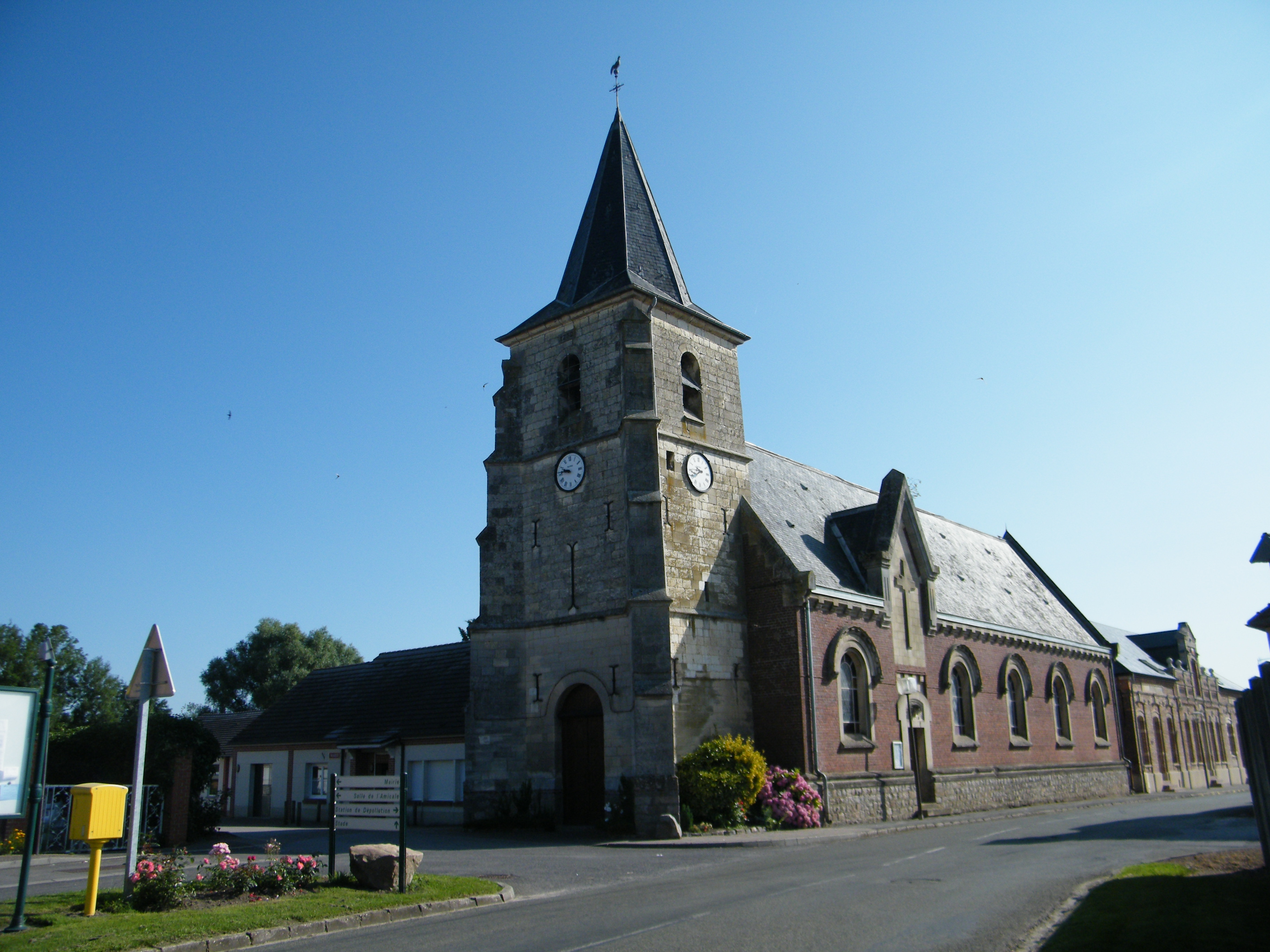 St-Hilaire.